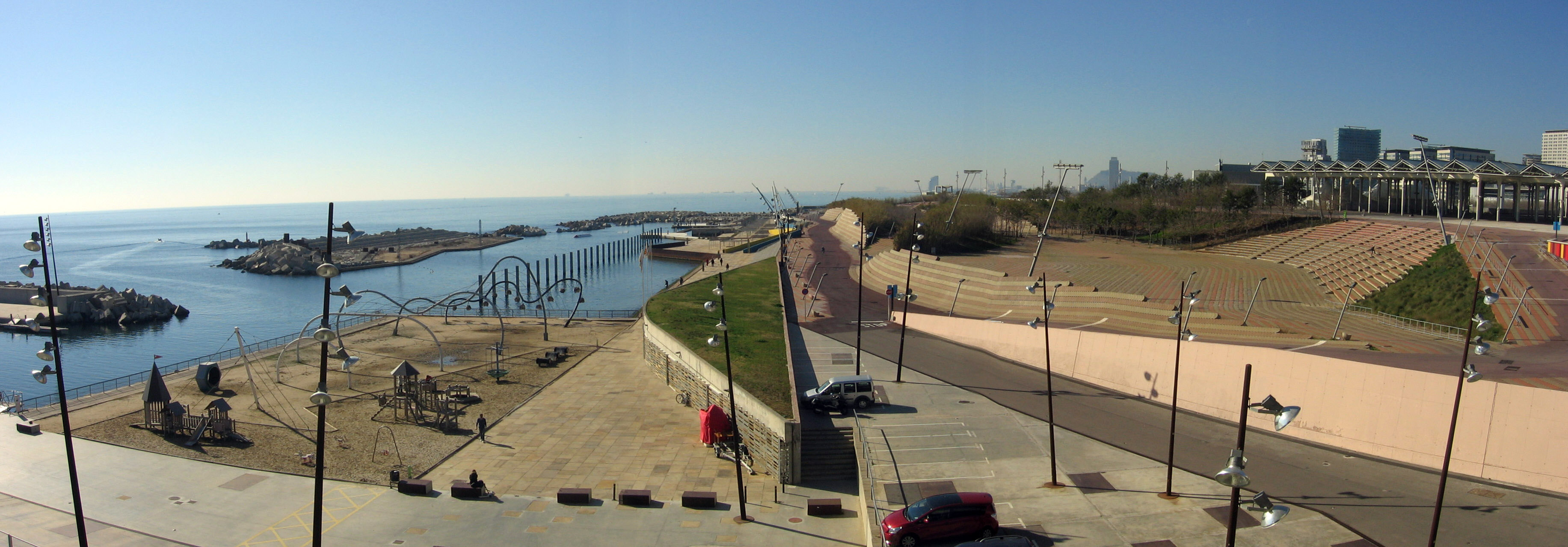 Parque de los Auditorios.